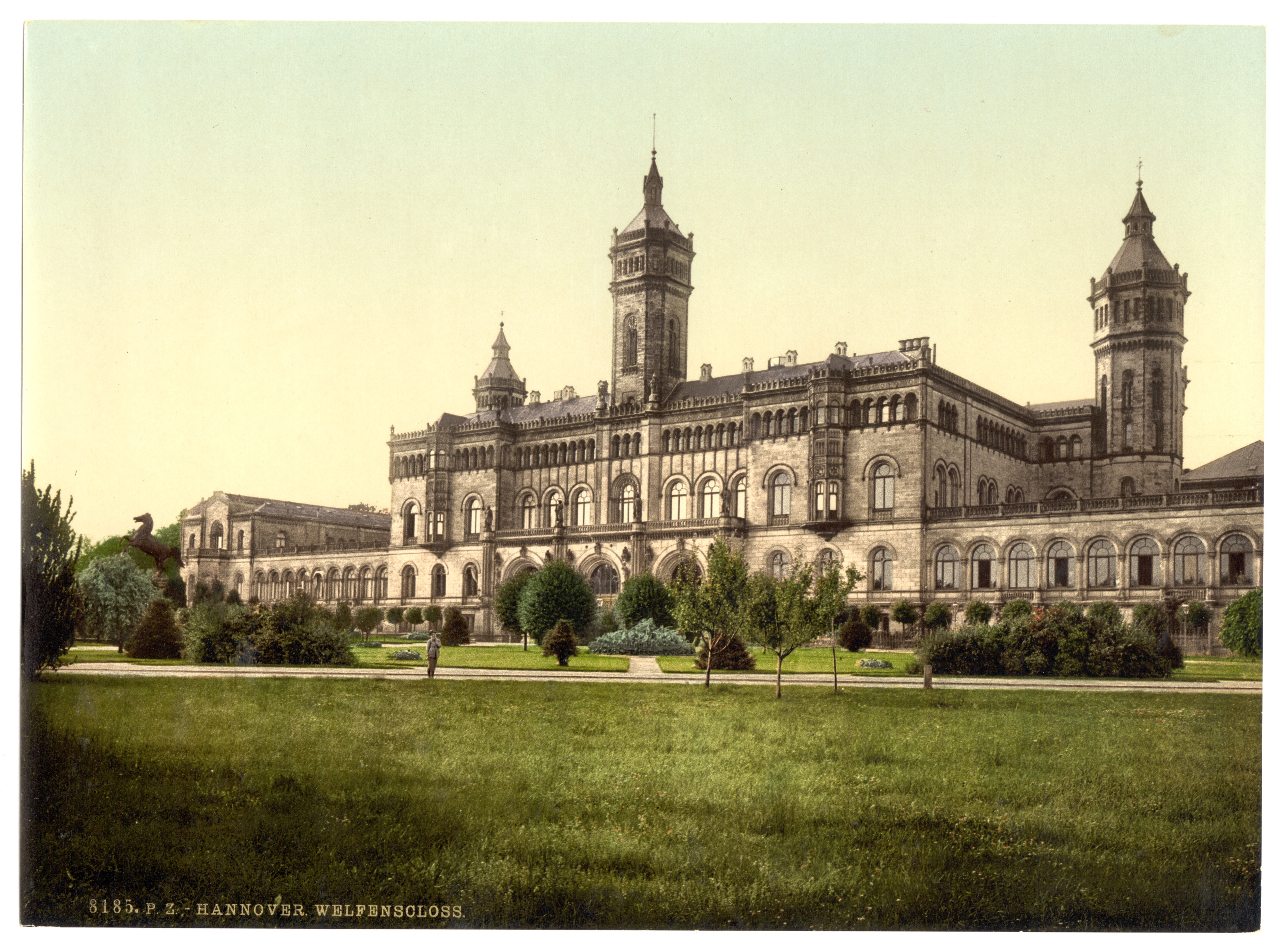 Hannover. Welfenschloss. ca. 1890-1900